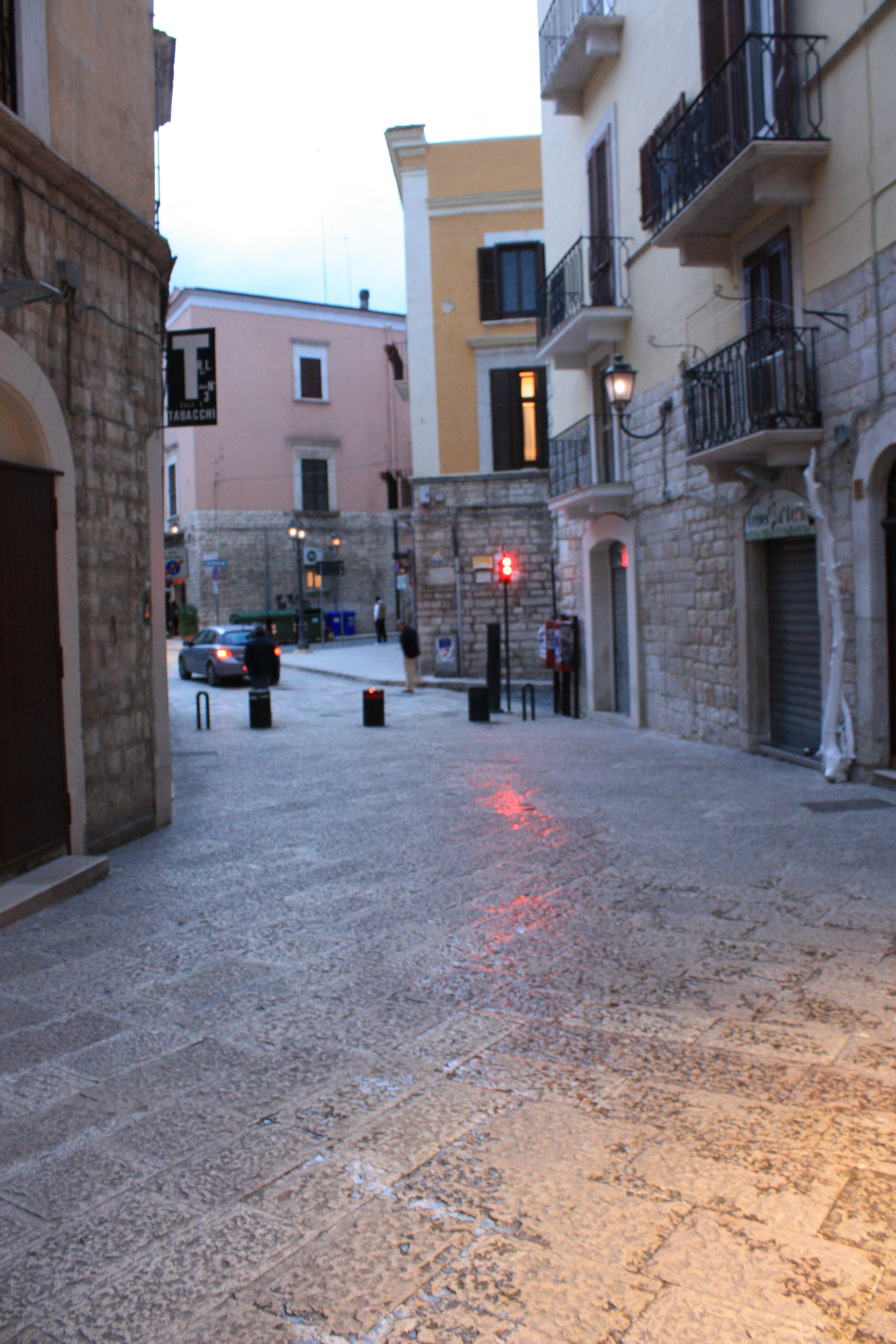 Via Duomo a Barletta